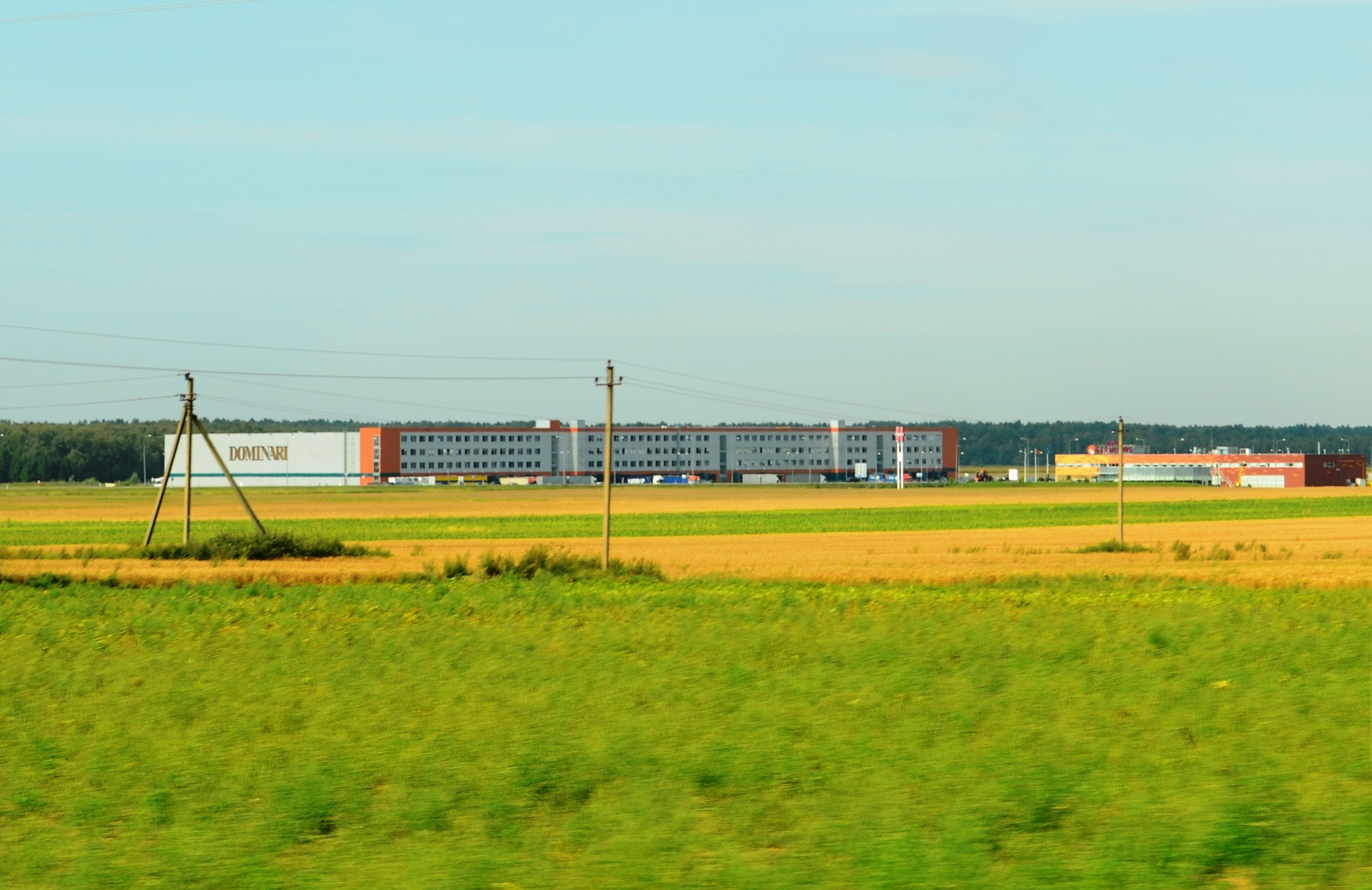 Logistikos centras, Šilagalys, Panevėžio r.